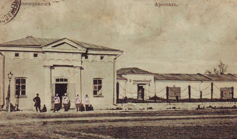 Новочеркасск (до 07.11.1917). Войсковой арсенал.